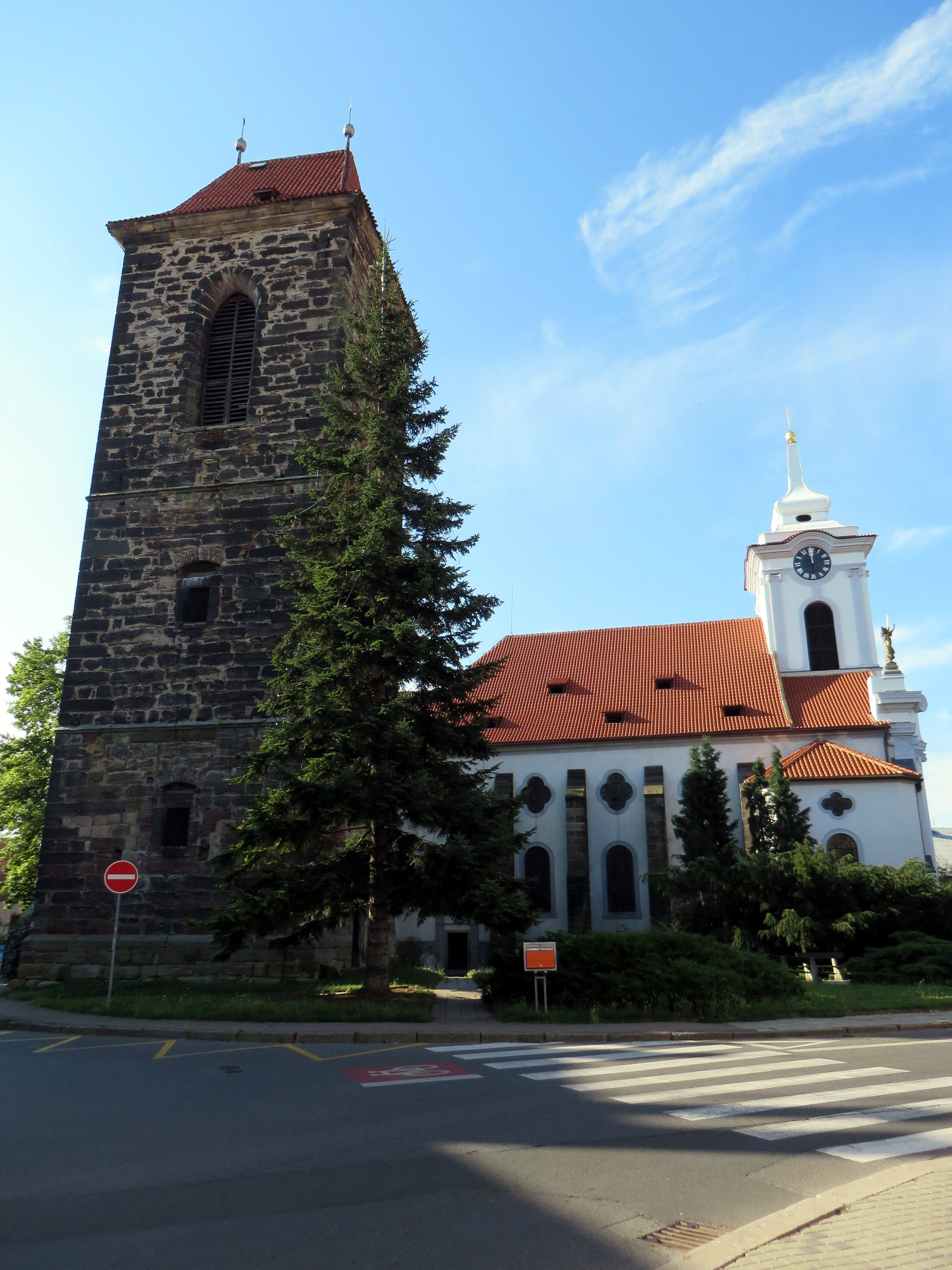 Kostel sv. Gottharda, nám. Arnošta z Pardubic, Český Brod, Český Brod.